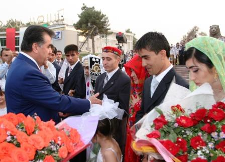 Эмомали Рахмон на церемонии бракосечетания молодёжи